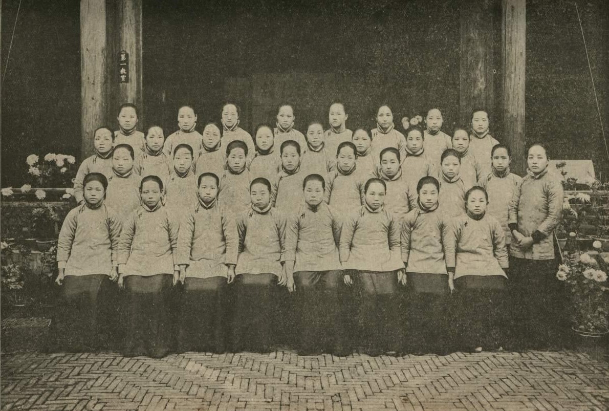 无锡县立女子师范学校第三年级全体撮影 妇女杂志(上海) 1915 年 第1卷 第5 期